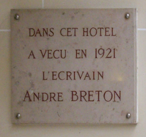 Plaque en mémoire du poète André Breton (1896-1966) apposée à l'entrée de l'hôtel Delambre, 35 rue Delambre, Paris 14e.